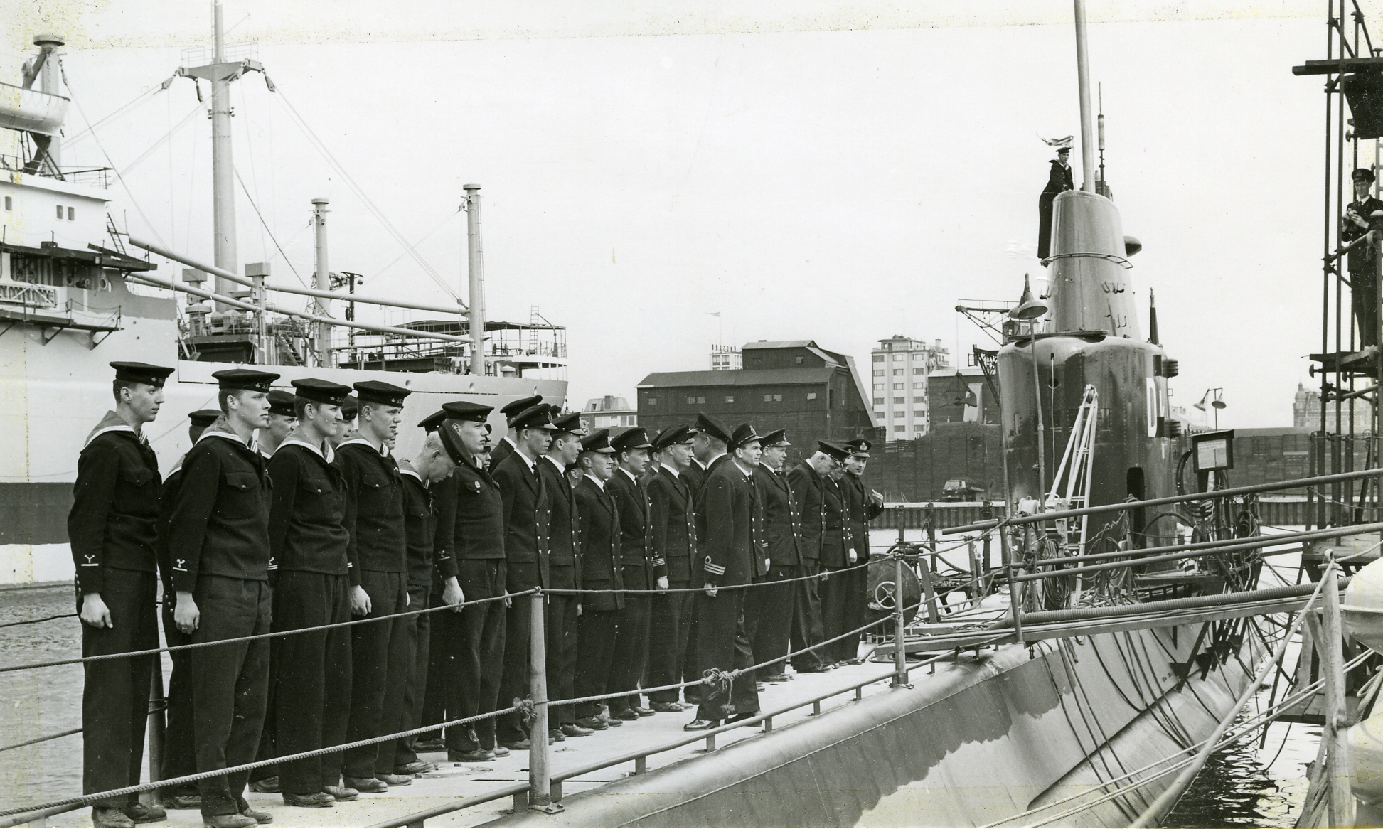 Befälstecknet hissas ombord på den nylevererade ubåten HMS Draken (Dra).